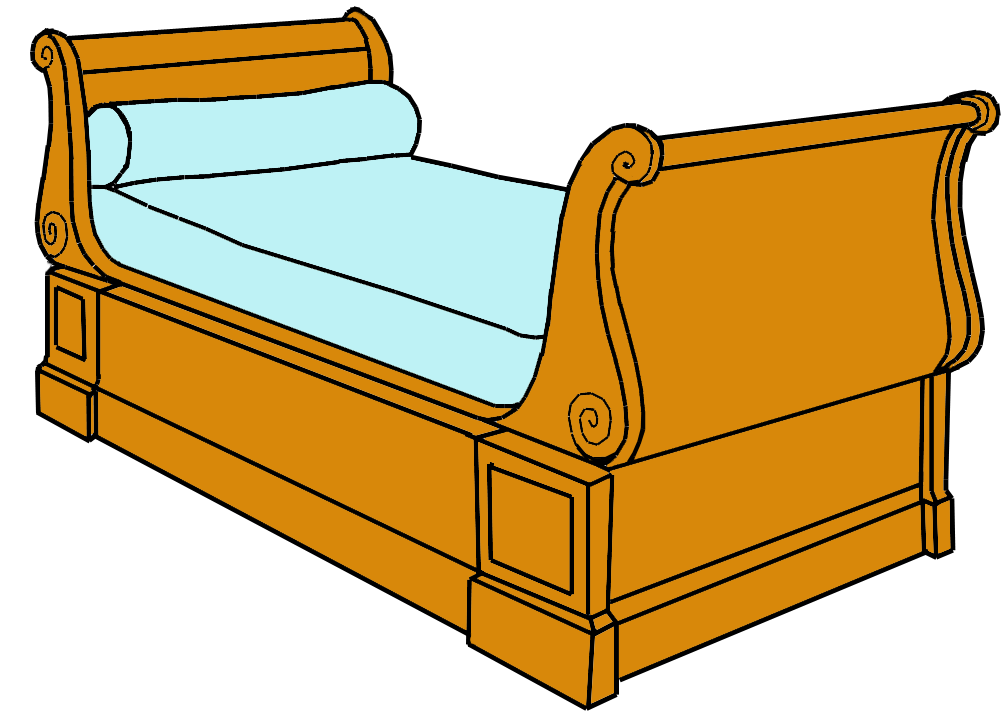 Lit bateau de style Louis philippe